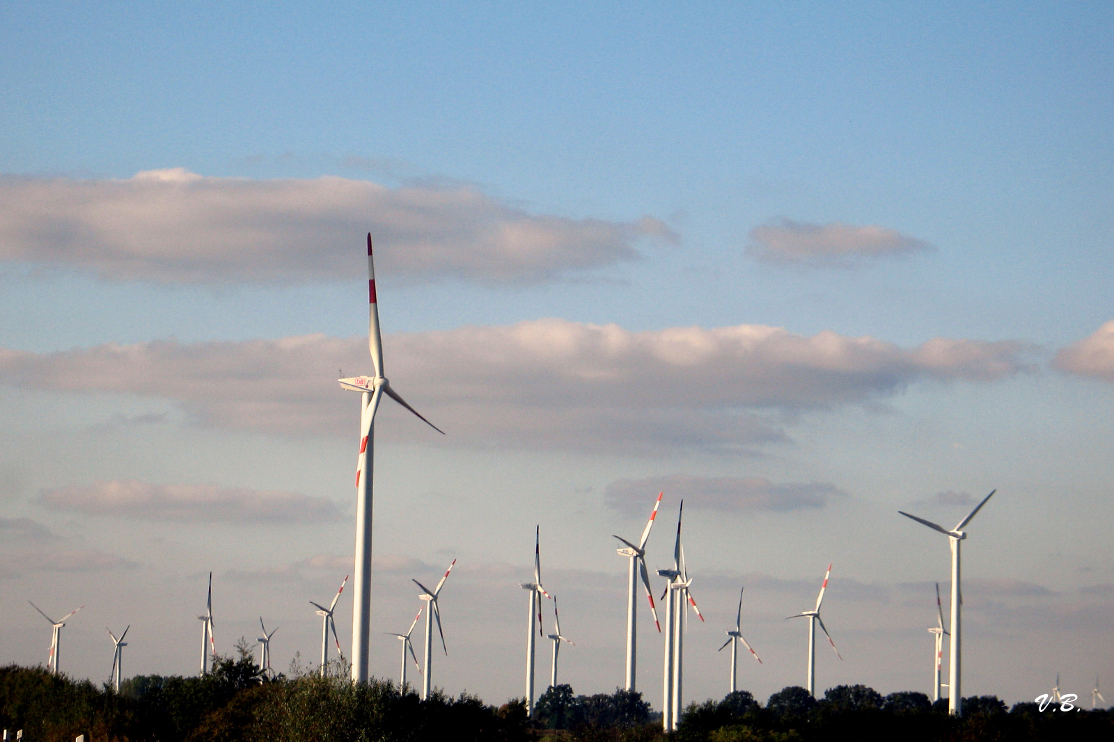 Район Нейруппина.